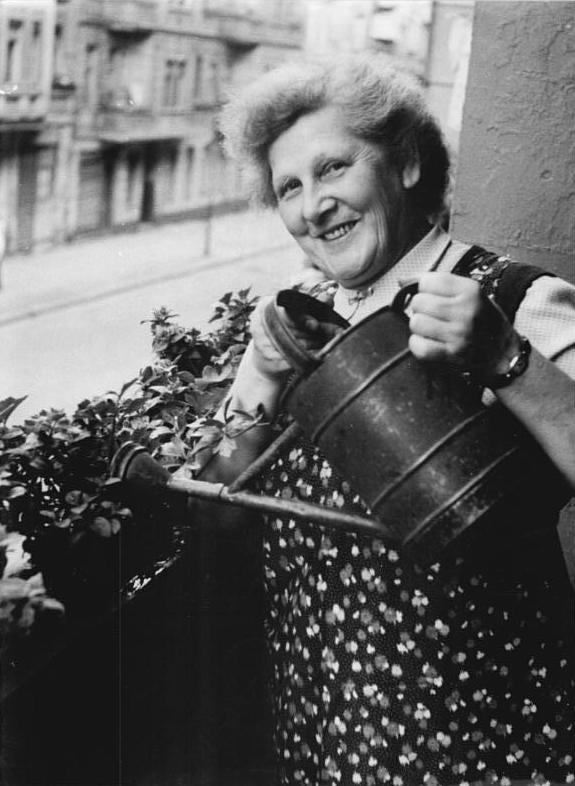 Blumengießen Zentralbild Hunge Bae-Ku. 5 Motive 6.8.1954 Eine wahre Vertreterin des Volkes. UBz: Nicht nur die Menschen wollen betreut werden, sondern auch die Blumen auf dem Balkon. siehe Begleittext.